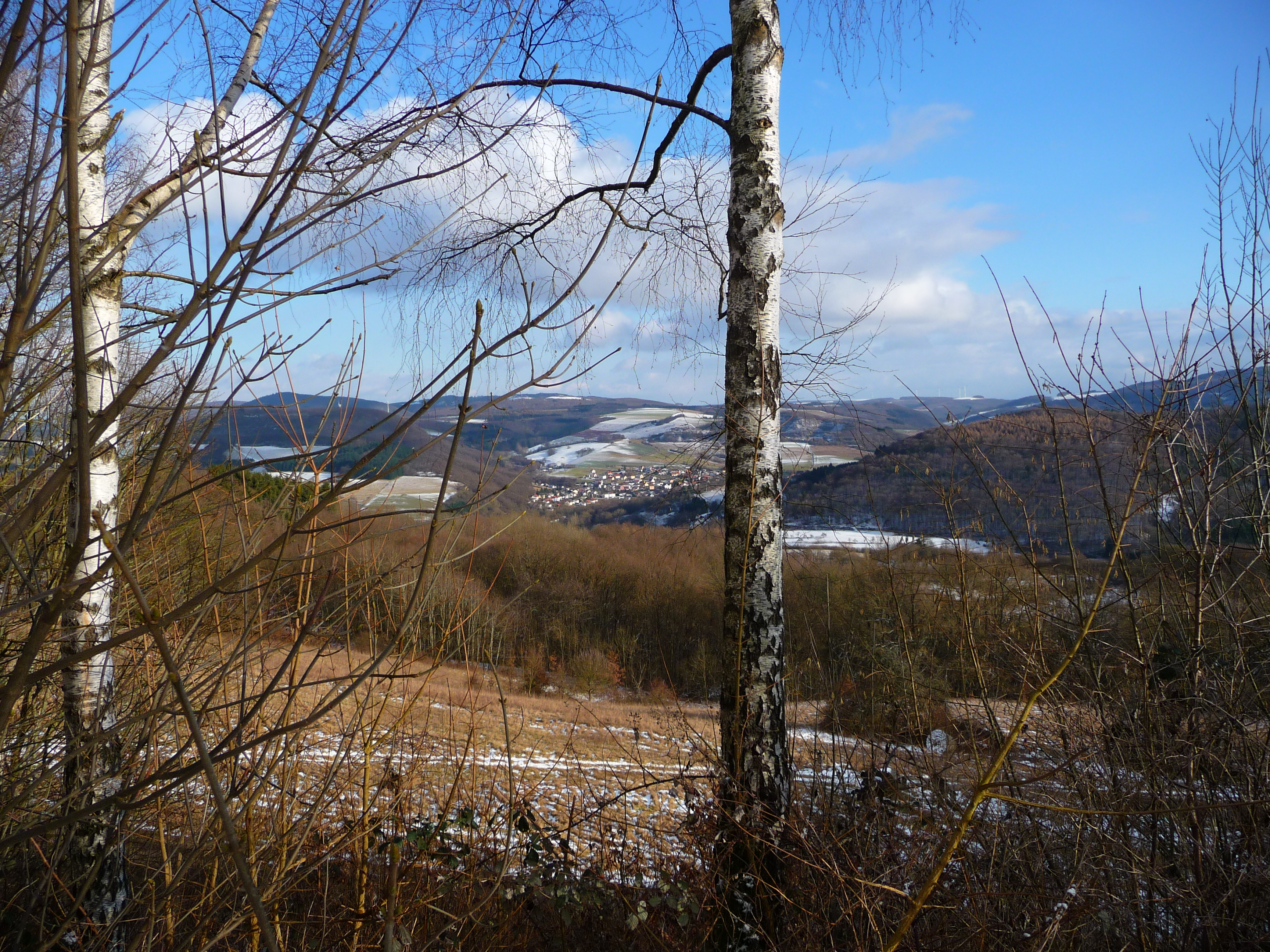 Blick von der K22 auf Bedesbach (Landkreis Kusel, Deutschland)